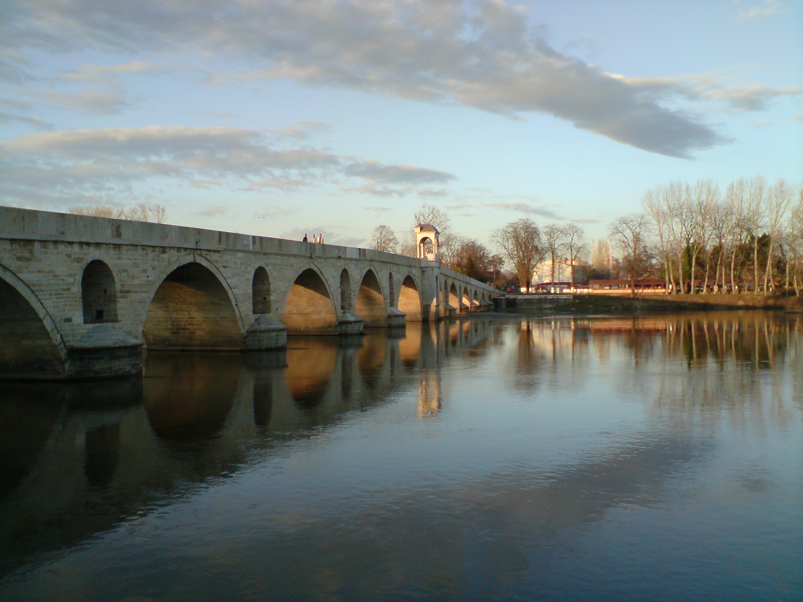 Aralık Ayında Meriç Köprüsü ve Meriç Nehri, Akşamüstü